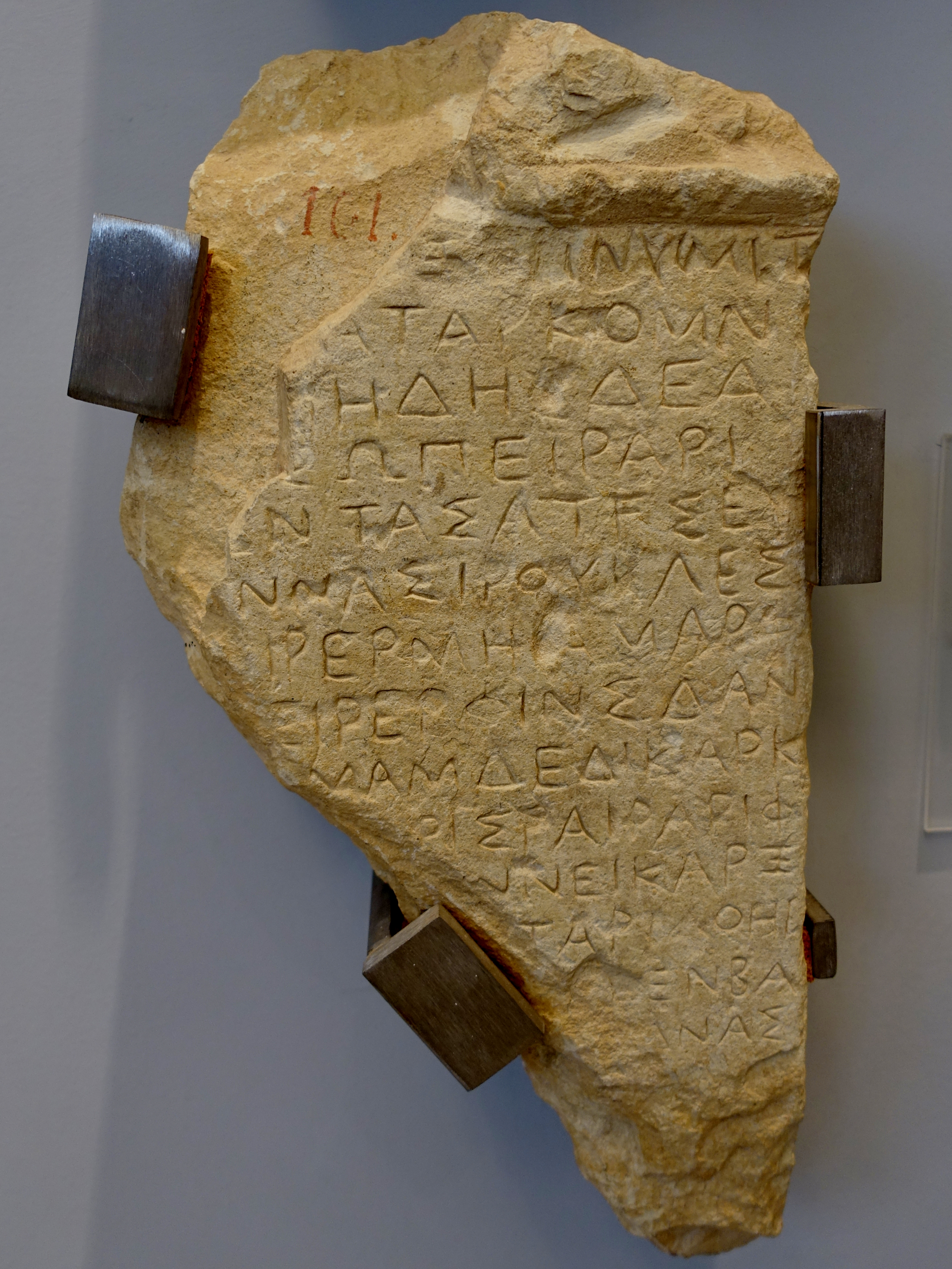 Eteokretische Inschrift, geschrieben mit griechisch-ionischem Alphabet, aus Praisos (4. Jahrhundert v. Chr.), ausgestellt im Archäologischen Museum Iraklio, Kreta, Griechenland